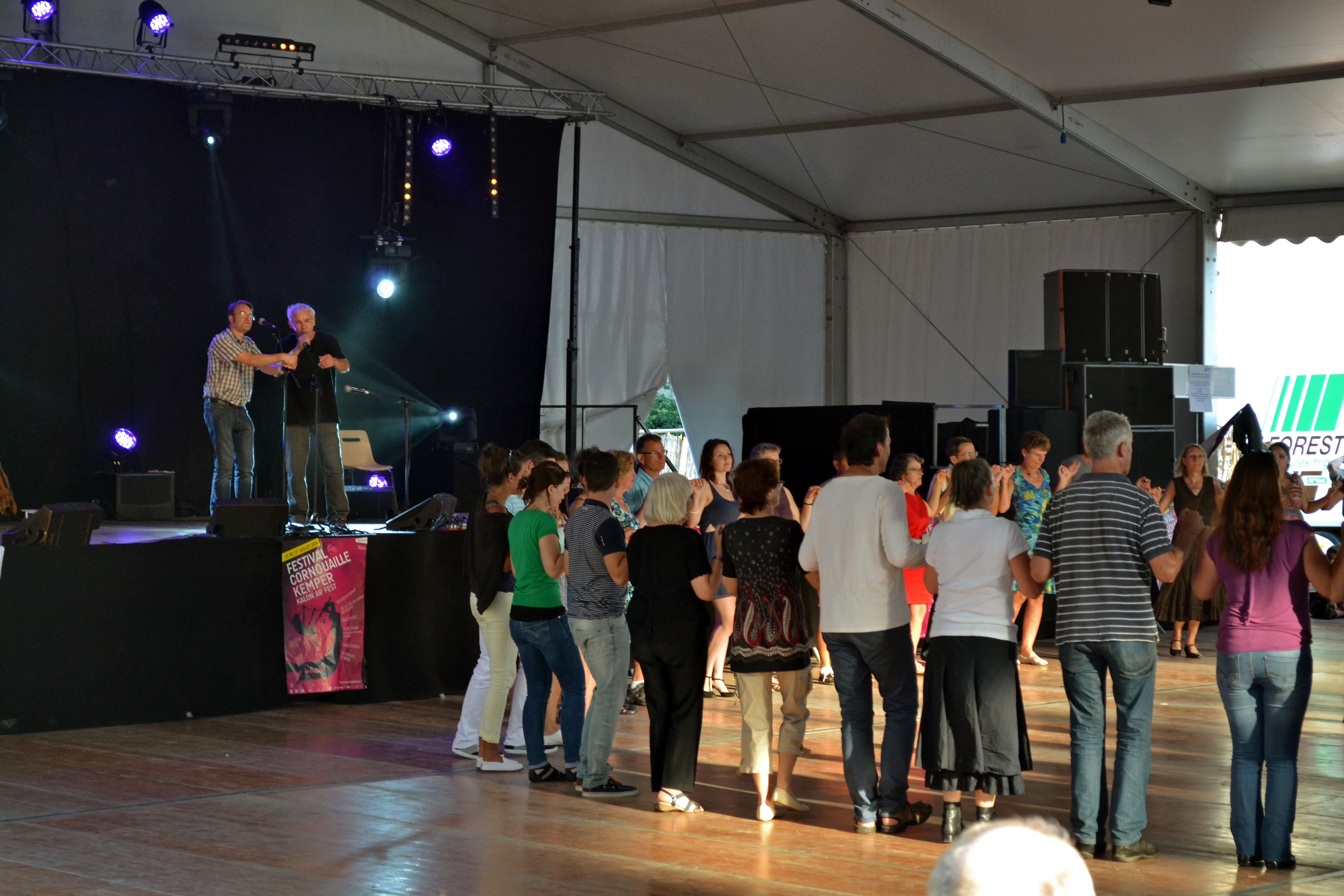 Pierre-Yves Petillon et Thierry Riou lors du fest-noz de l'association Dastum à l'espace Saint-Corentin dans le cadre du festival de Cornouaille le 22 juillet 2014.